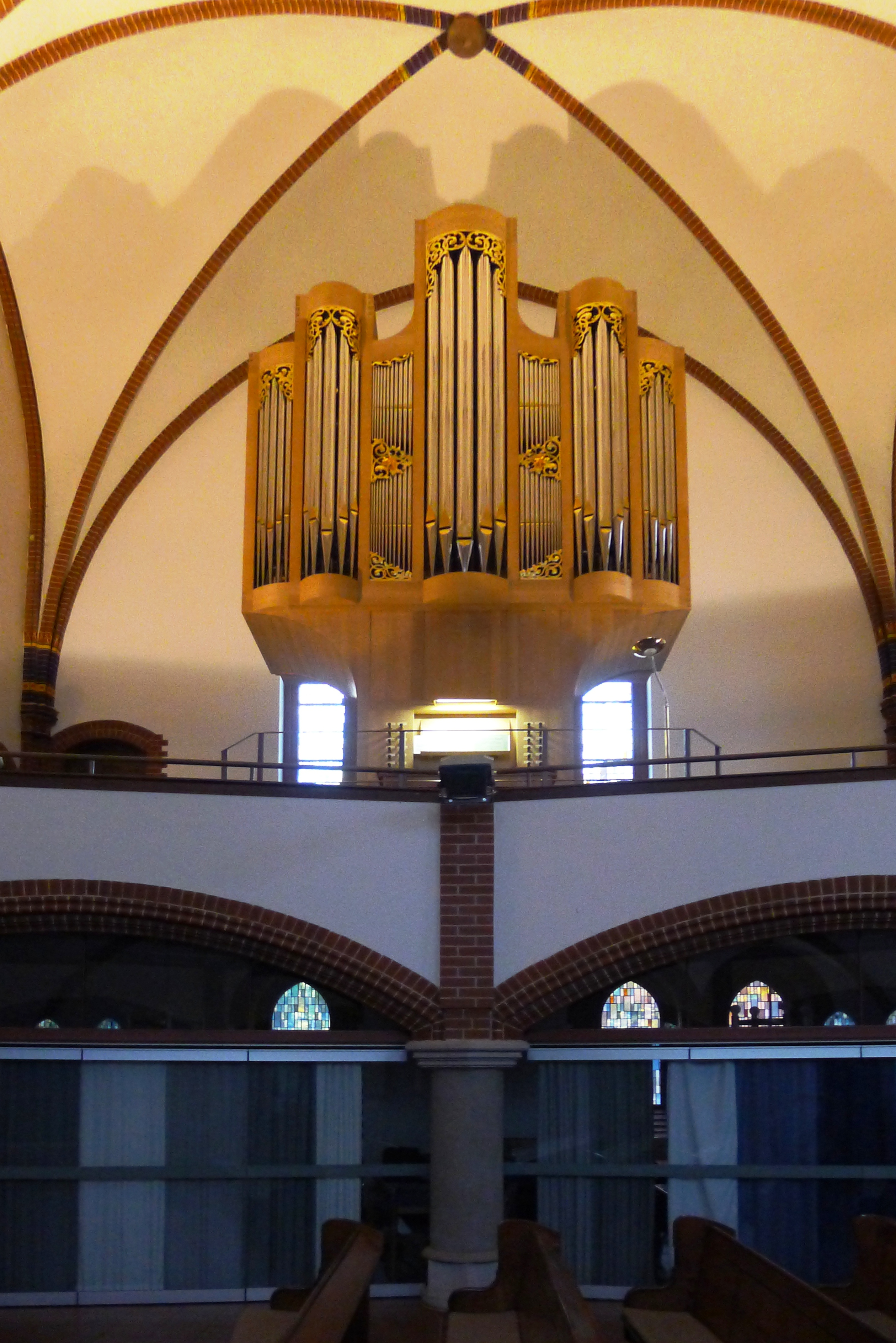 neue Orgel im Querschiff